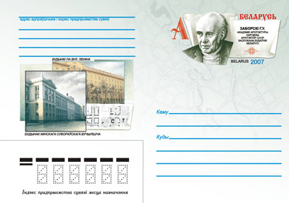 Конверт, выпущенный 26 декабря 2007 года в серии "Выдающиеся зодчие Беларуси". Заборский Г. В. Академик архитектуры, народный архитектор СССР, заслуженный строитель Беларуси. Здания по улице Ленина. Здание минского Суворовского училища — на бел. языке, изображения здания по улице Ленина, здания минского Суворовского училища и архитектурного чертежа. Художник конверта - Микола Рыжий.